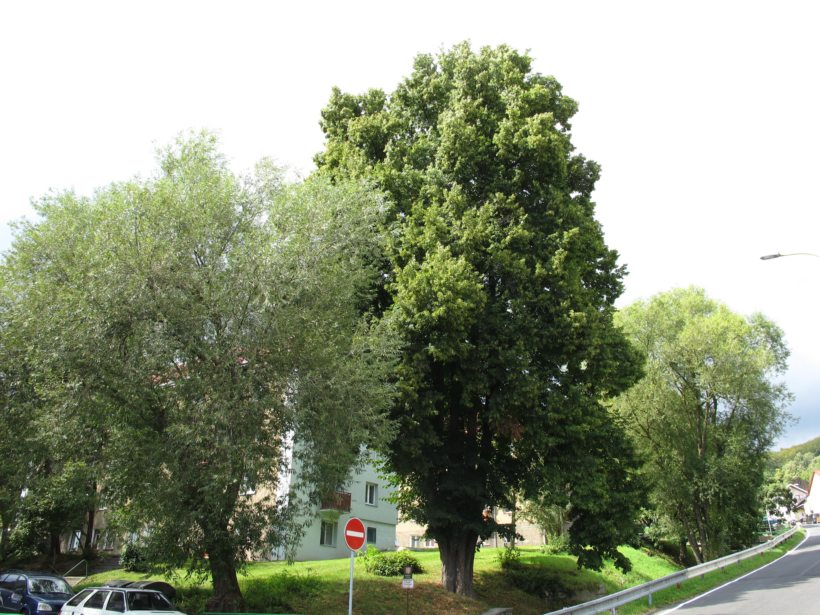 Chráněná lípa velkolistá v Potoční ulici v Meziboří